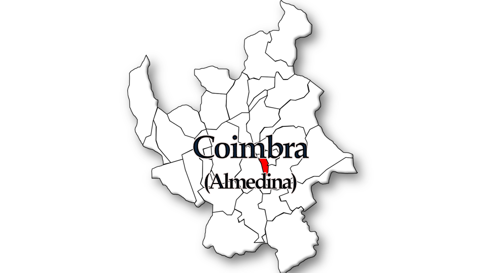 População